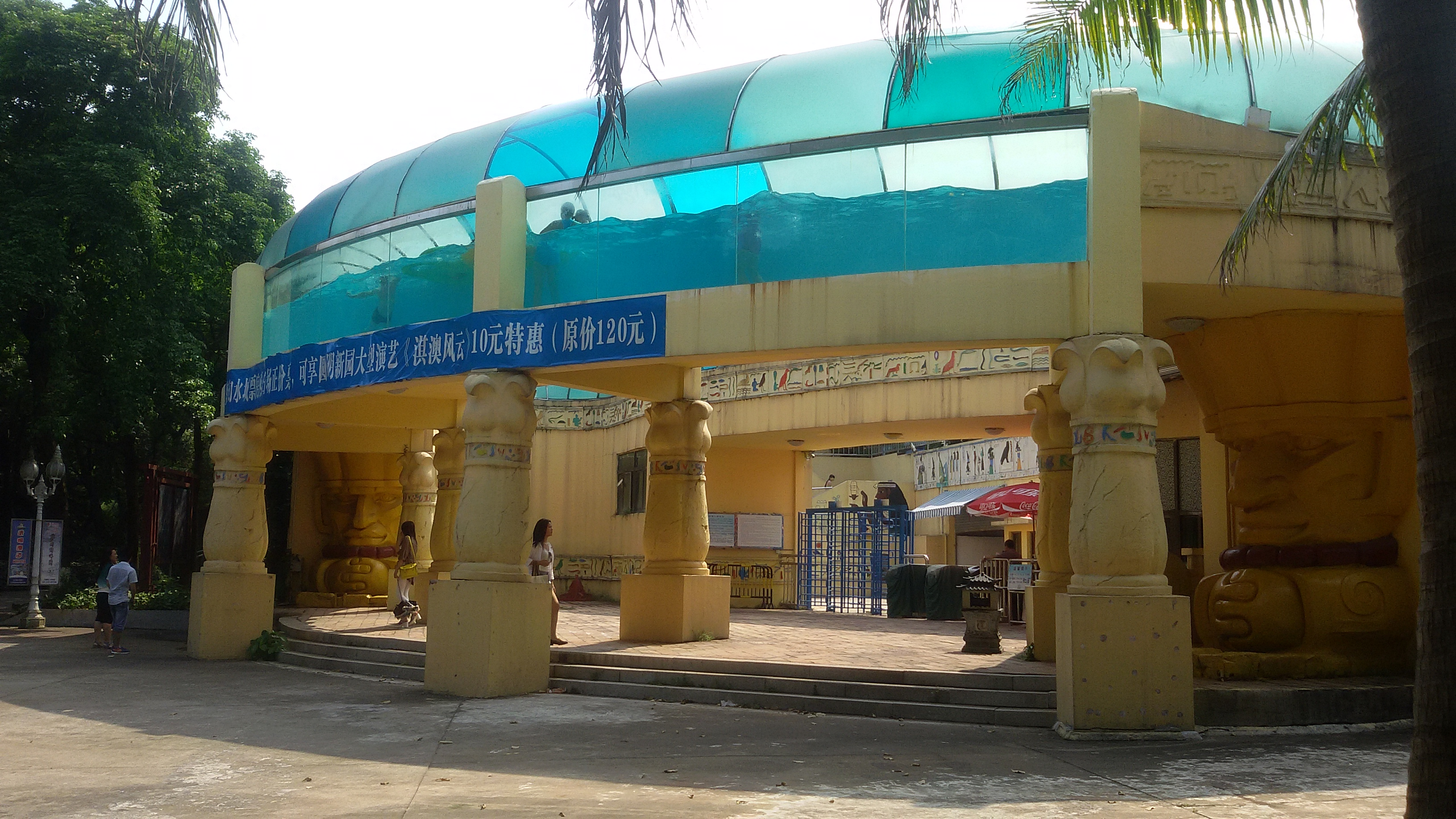 粵語: 珠海夢幻水城